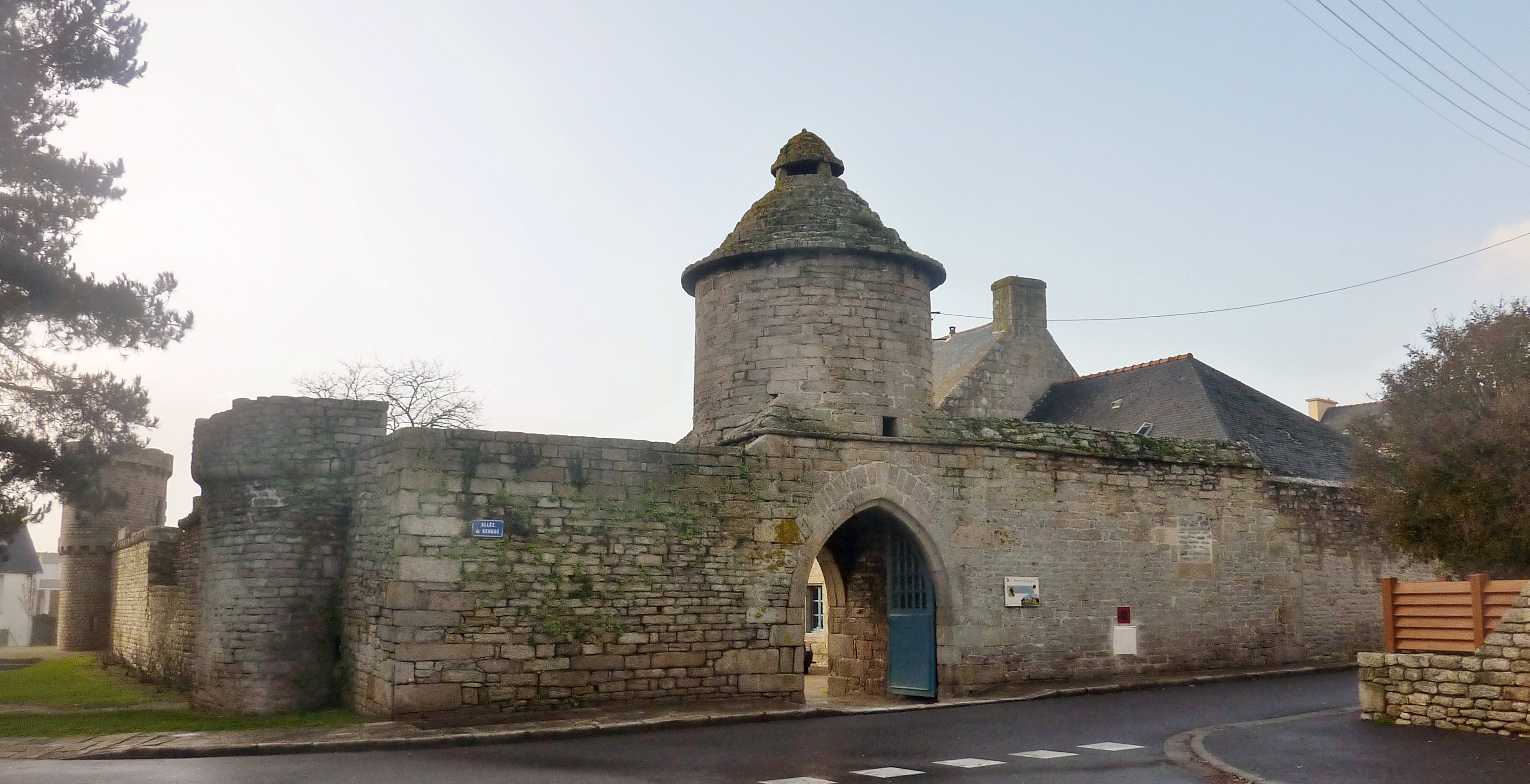 Le Guilvinec : l'entrée du manoir de Kergoz